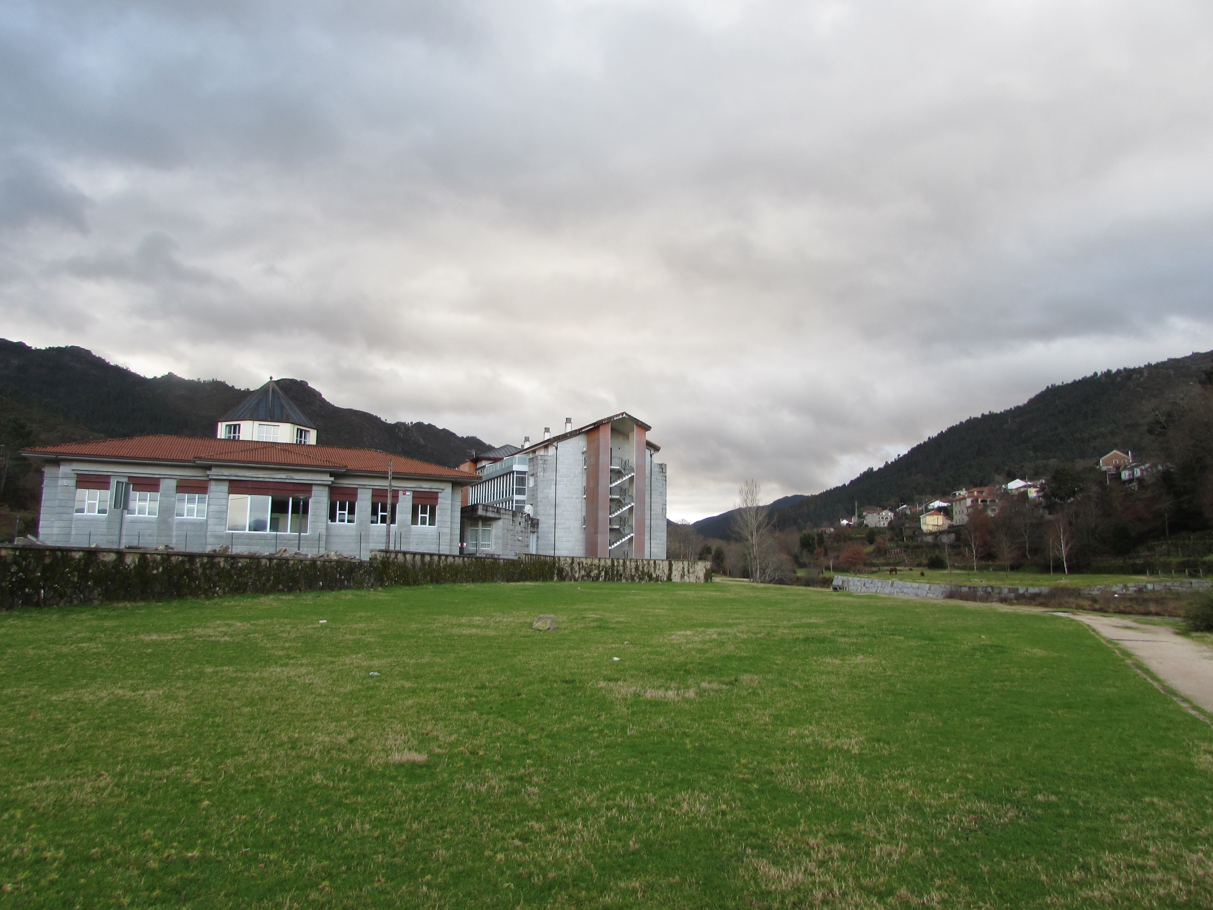 Balneario de Riocaldo, Lobios.